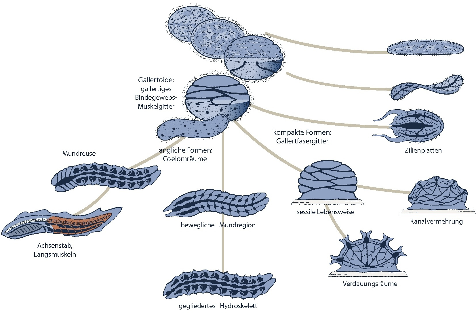 Hauptevolutionslinien des Tierreiches ausgehend von dem hypothetischen Vorläufer aller vielzelligen Tiere: die Gallertige. Es handelt sich hierbei um Organismen mit einem durch kollagene Fasern intern kompartimentierten Körper, der außen von einer cilienbesetzten Zellschicht umgeben ist. Durch den Körper verlaufen ebenfalls cilienbesetze Kanäle. Die Körperform und der Verlauf der Kanäle, sowie die mechanischen Notwendigkeiten bestimmen und ermöglichen die Differenzierung in nur wenige Hauptlinien: flache Formen, kompakte Formen mit Cilienantrieb, sessile Formen und frei schwimmende Formen. Von diesen ausgehend differenzieren sich alle weiteren Evolutionslinien des Tierreiches. Namensnennung: Manfred Grasshoff, Michael Gudo, Tareq Syed